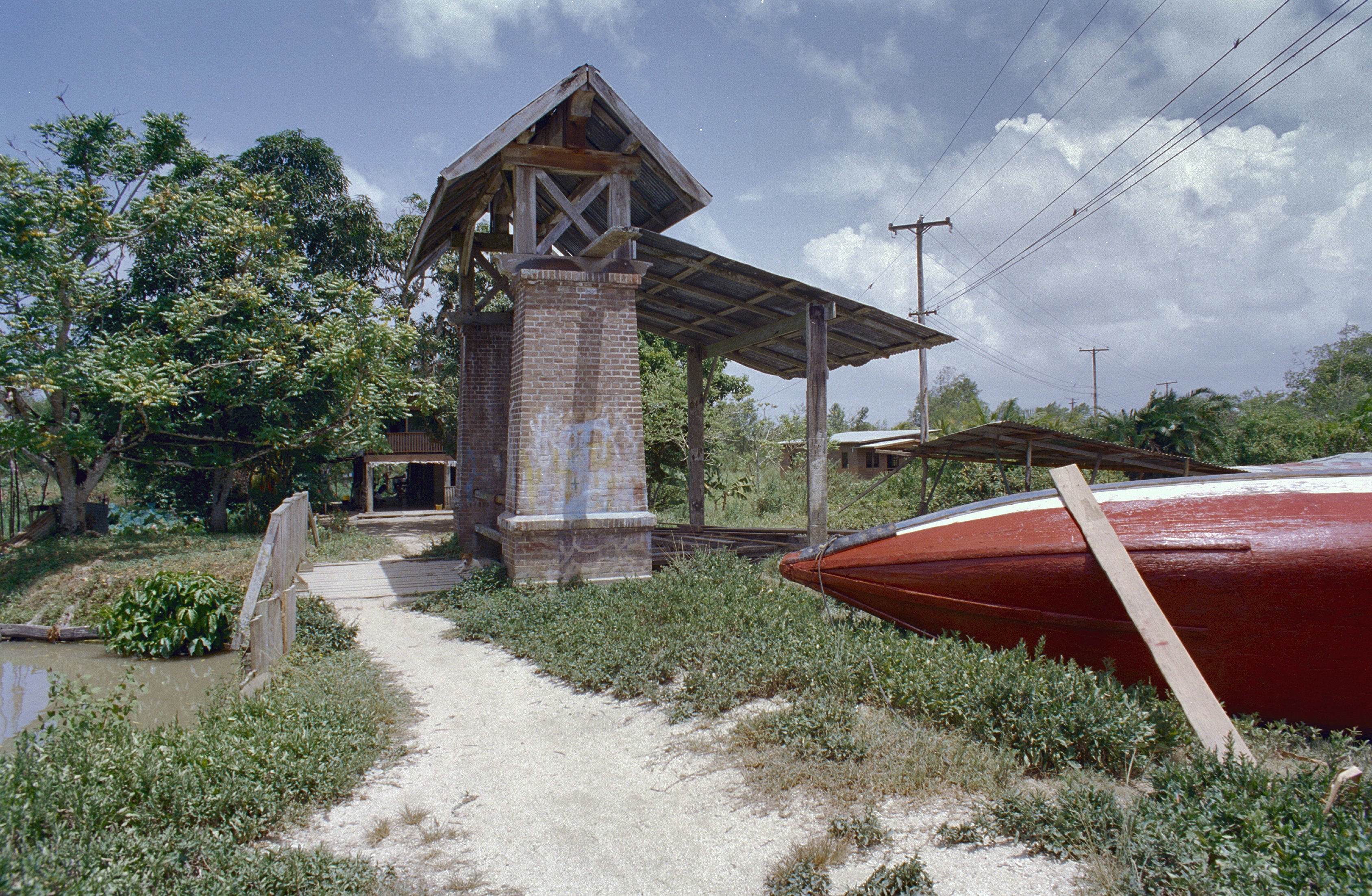 Plantage Johannesburg: Overzicht van sluisgebouw (opmerking: Suriname reis Loek Tangel)